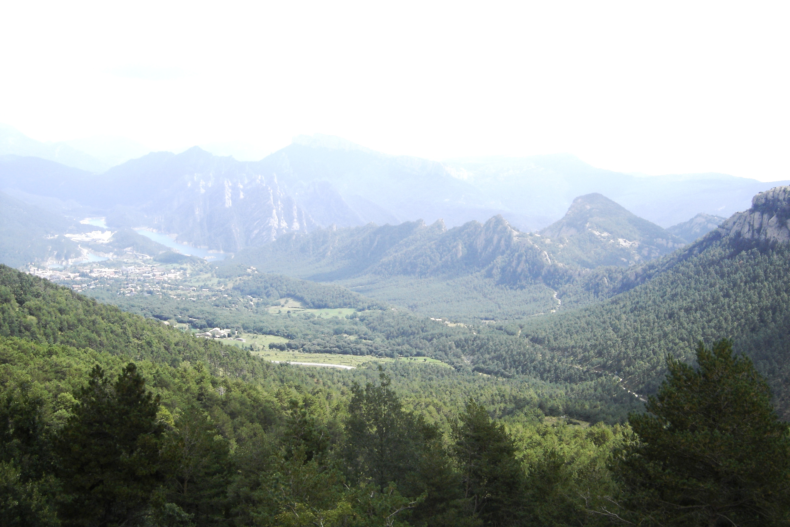 Al centre de la fotografia, la vall del Torrent de les Salines (Guixers, Vall de Lord) Al fons de la vall, el pantà de la Llosa del Cavall. A l'esquerra de la vall, la vila de Sant Llorenç de Morunys. A la dreta de la vall, les Roques de Lord de Lord i la Collada de la Creu de Canalda que les uneixen amb la Serra de la Creu del Codó (Guixers). Darrere les Roques de Lord, a la dreta de la imatge, el vessant nord-occiental del Tossal de Vall-llonga. A la dreta del pantà, els Llengots i la Serra dels Bastets.